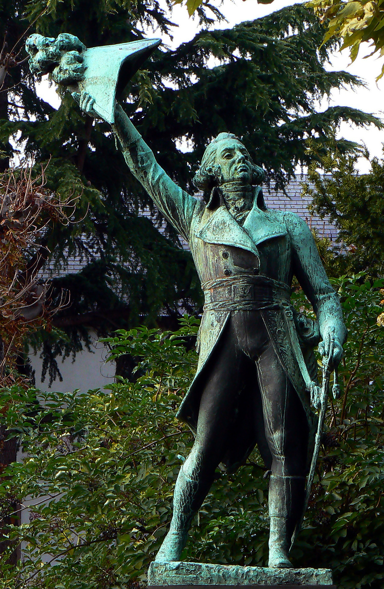 Es grüßt Herr Kellermann